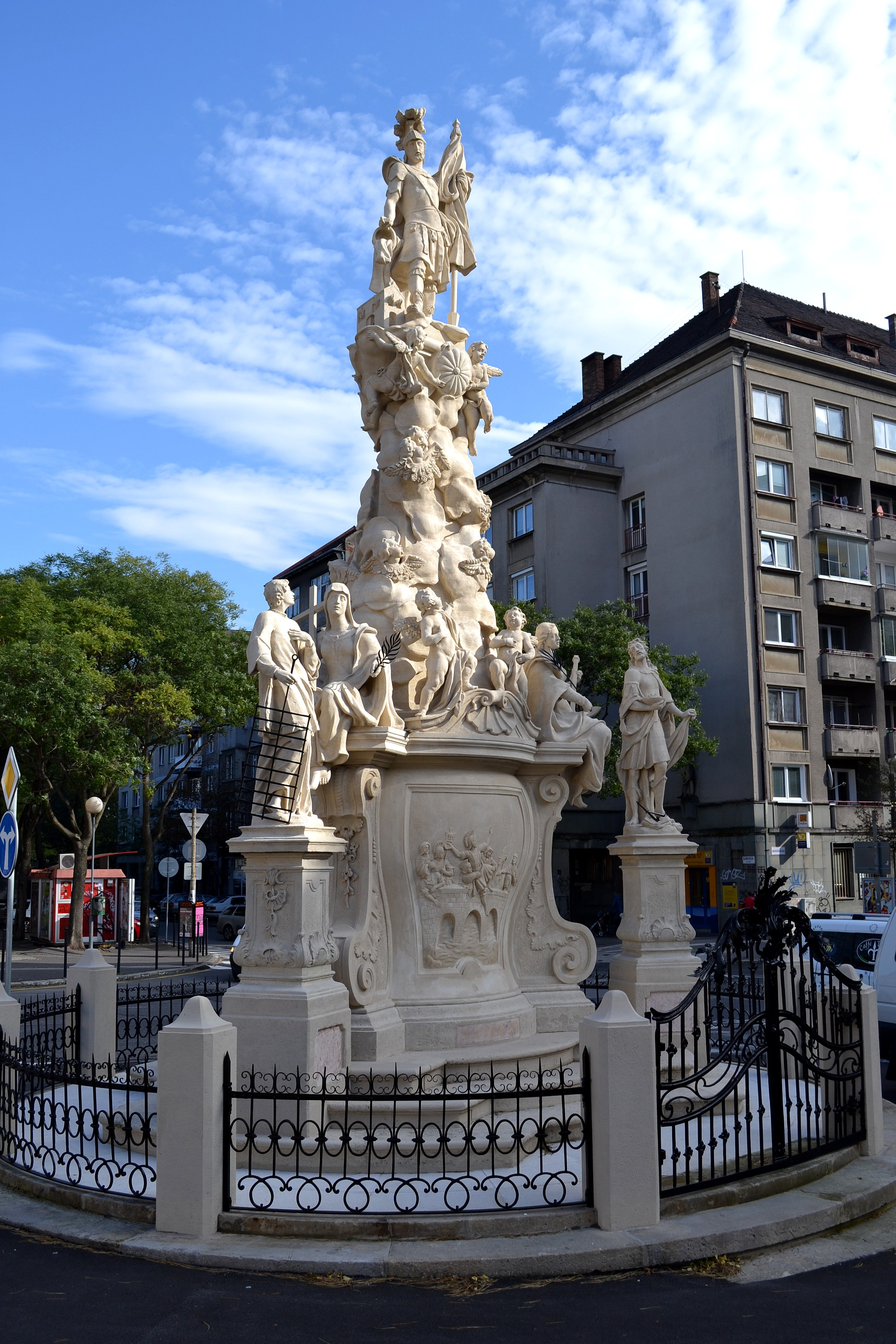 Stĺp svätého Floriána na Flriánskom námestí v Bratislave. Celkový pohľad na stĺp